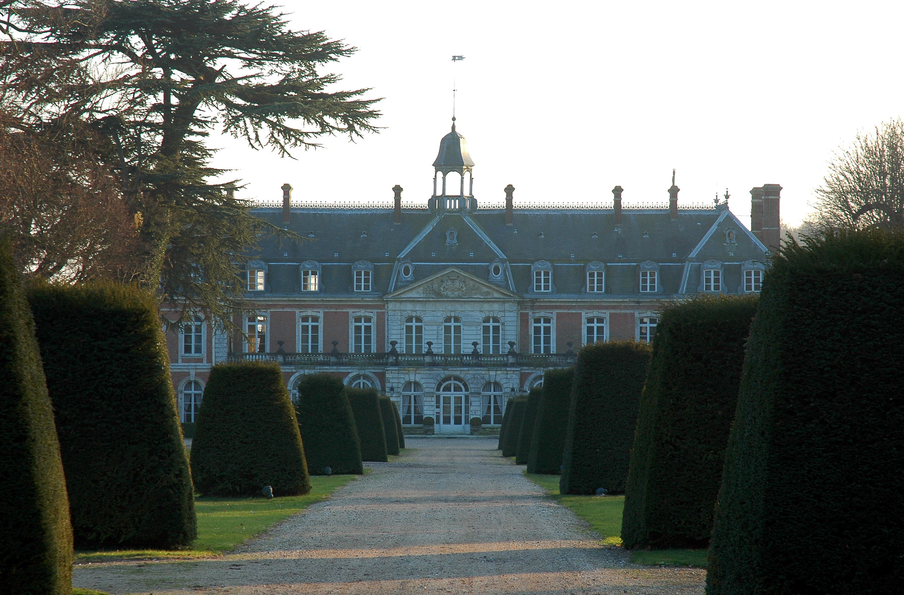 Villequier (Seine-Maritime, France). Le château.